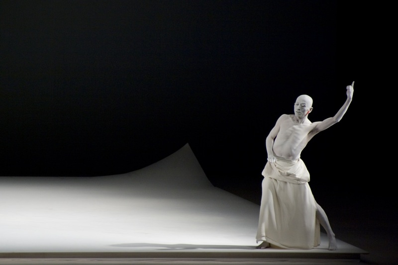 Espectáculo presentado en el Festival Cervantino llamada Kagemi: Más allá de la metáfora de los espejos, Sankai juku pertenece a la segunda generación de los grupos de la danza Butoh, movimiento que emergió en los años setenta como una expresión crítica de la conciencia humana.